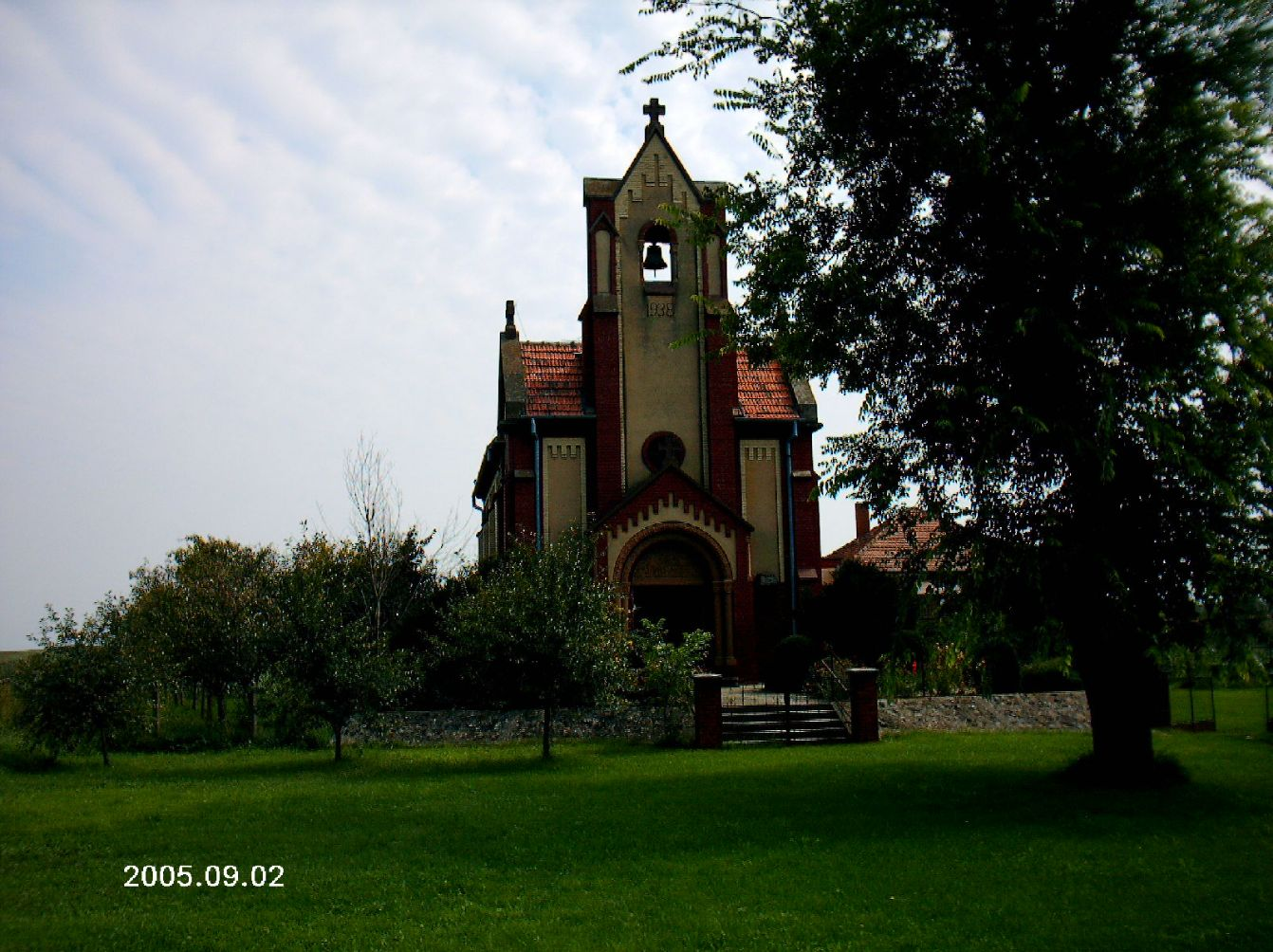 Katolikus templom